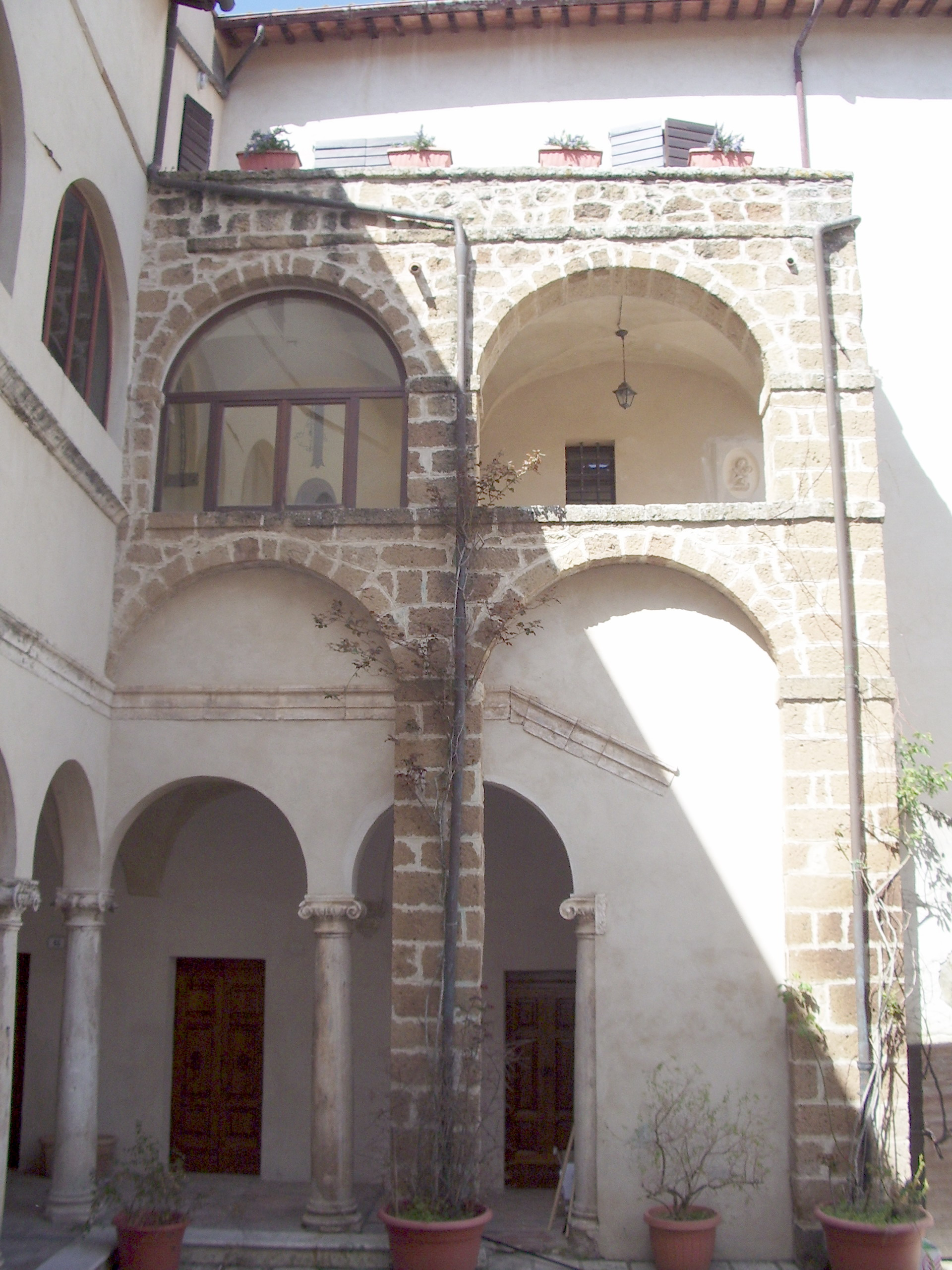 Parziale veduta dei loggiati delle facciate interne di Palazzo Orsini a Pitigliano